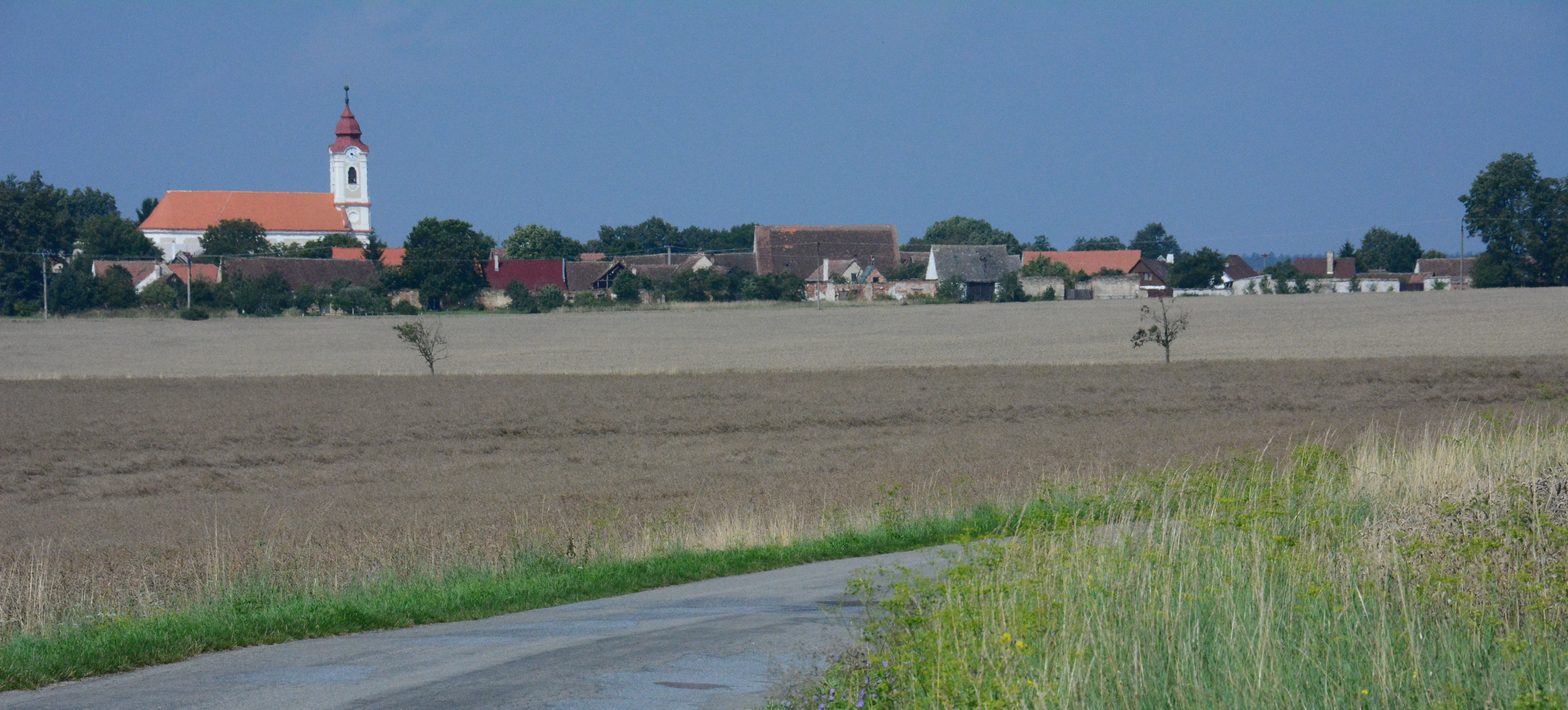 Šafov / Schaffa im Jahr 2014